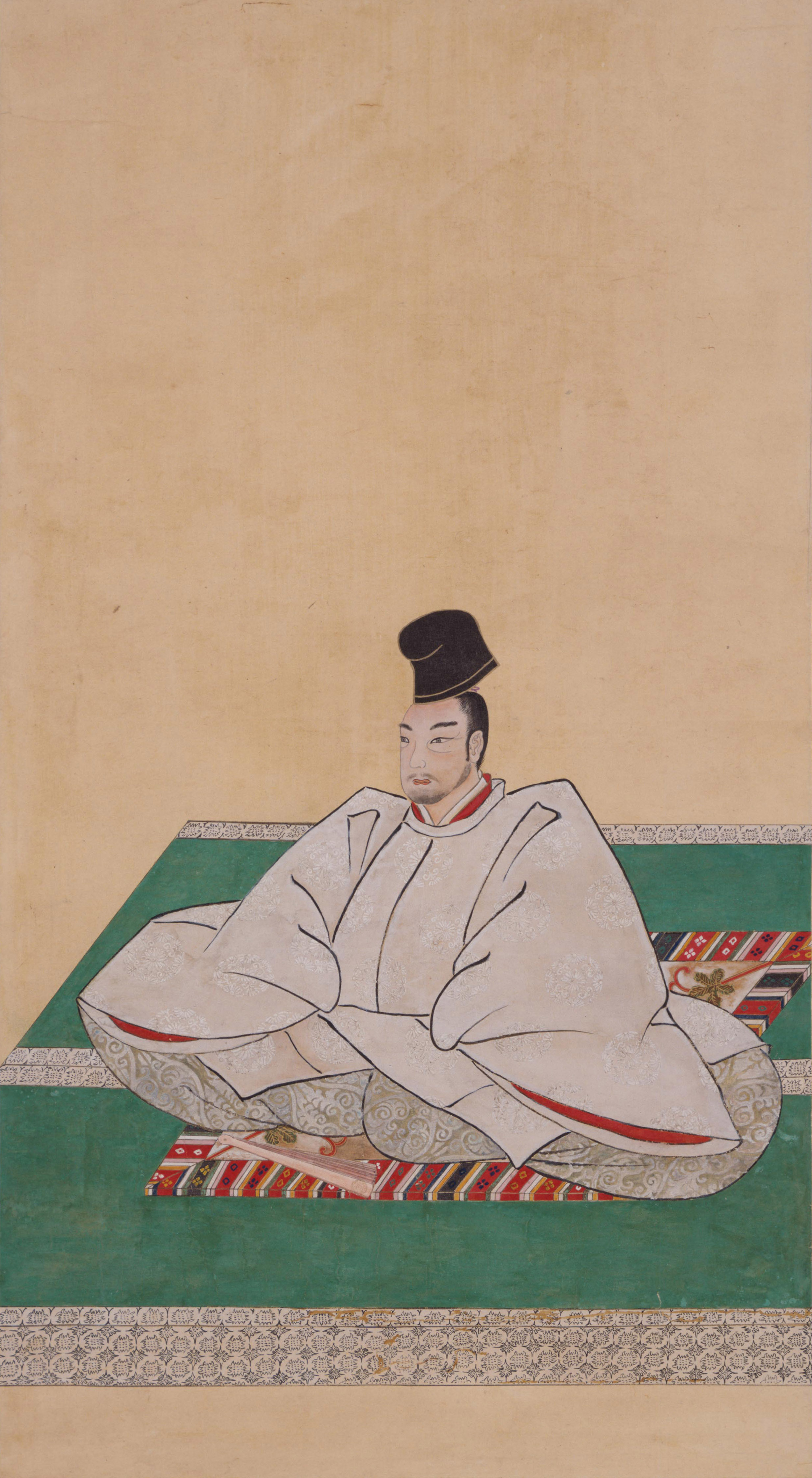 閑院宮直仁親王の肖像。